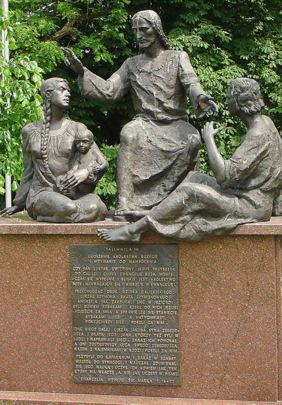 Częstochowa, zespół klasztorny paulinów na Jasnej Górze